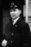 Зоф В.И. 1926